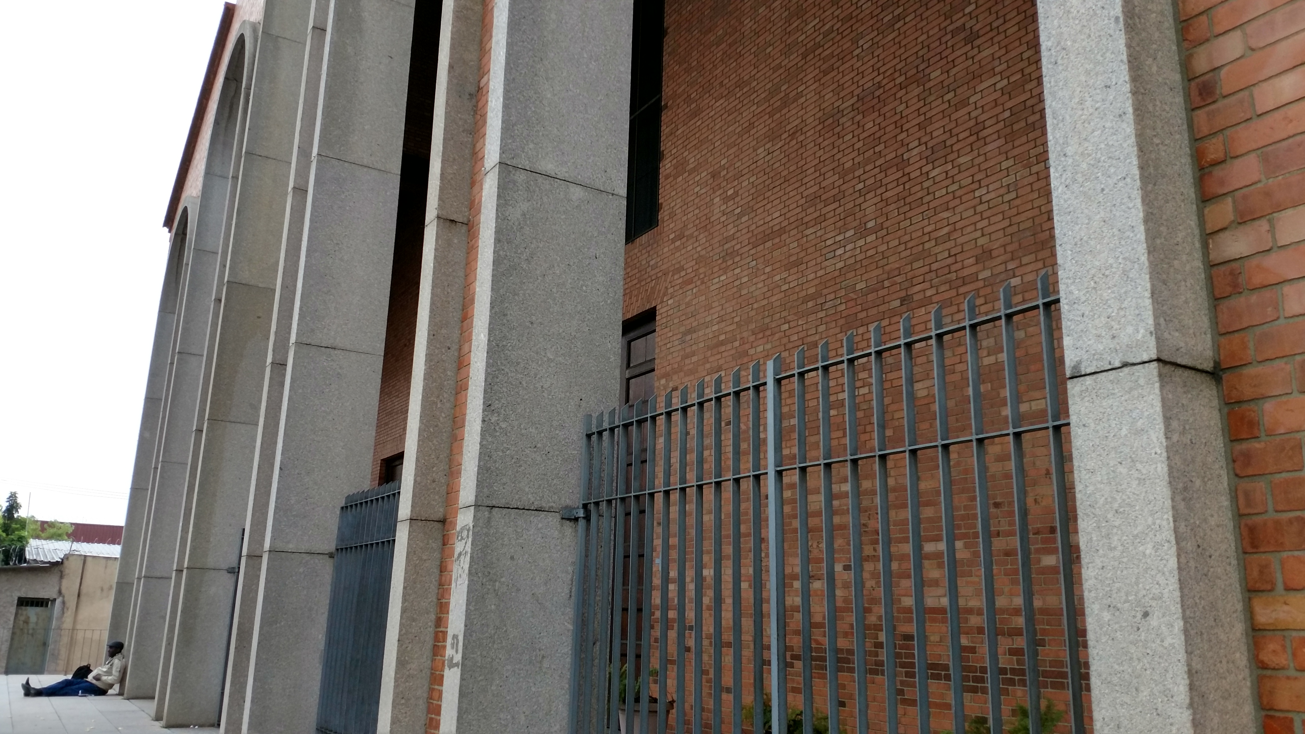 Foco da arquitetura da Paróquia Nossa Senhora da Paz, em São Paulo (SP). Destaca-se os arcos de concreto.